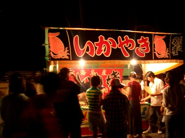 いかやき